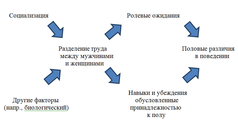 Различные влияния, в том числе детский опыт и биологические факторы, склоняют мужчин и женщин к выбору различных ролей. Именно ожидания, навыки и убеждения, связанные с этими различными ролями, и влияют на поведение мужчин и женщин.